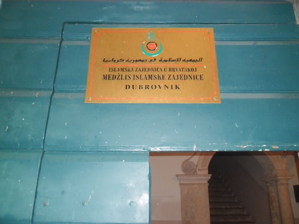 natpis na ulazu u zgradu dubrovačke islamske zajednice